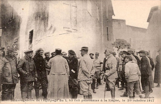 Forhøret af besætningen fra L 45 tilfangetaget i Laragne 20. oktober 1917